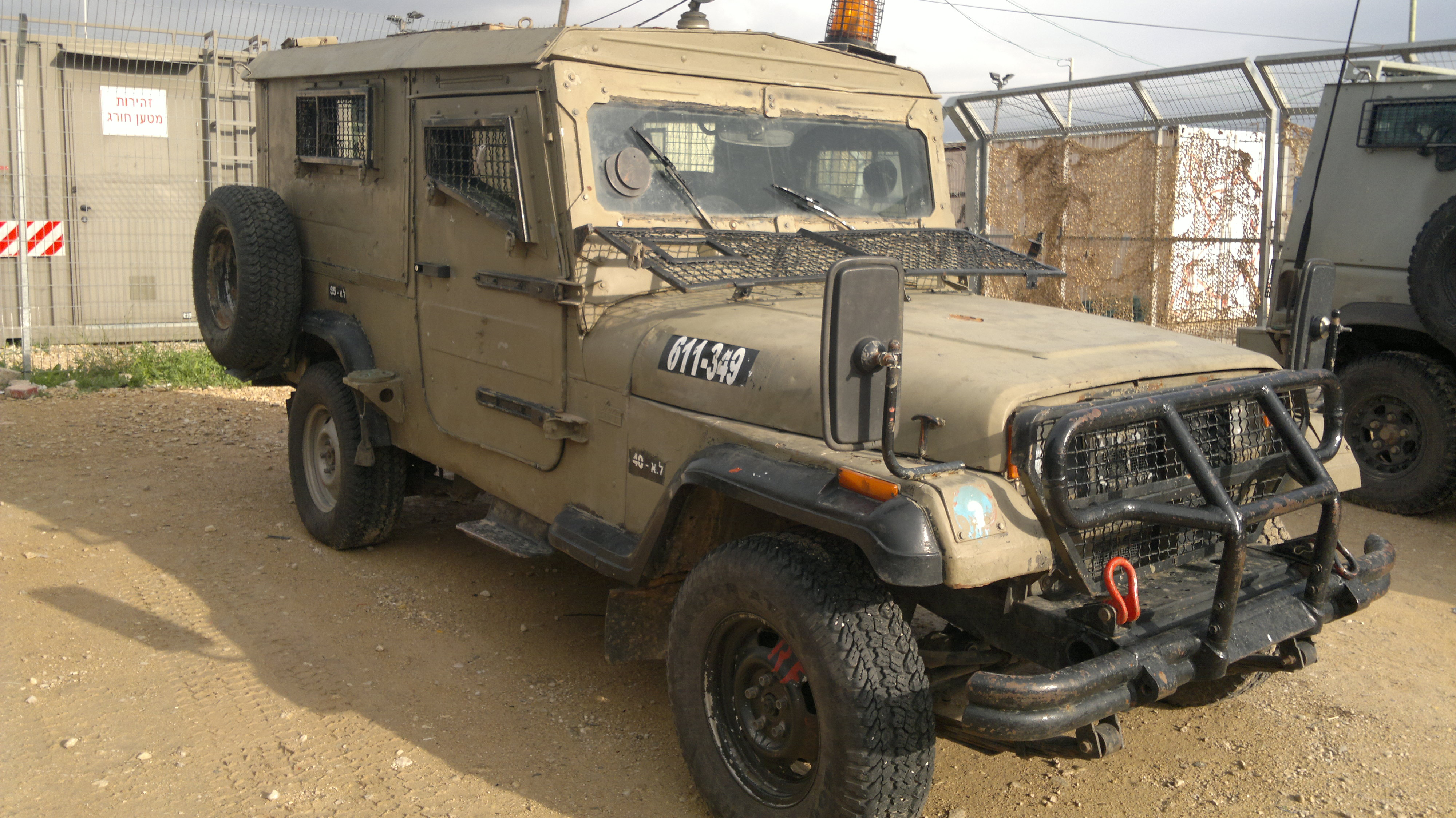 סופה ממוגנת